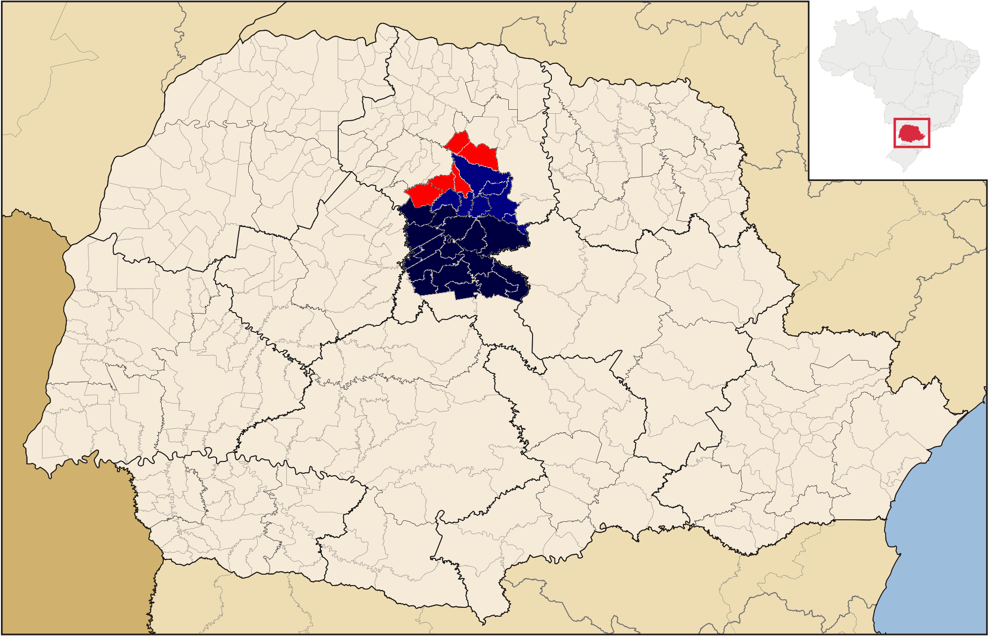 referencia ao projeto da RM de Apucarana 1998 - 2015